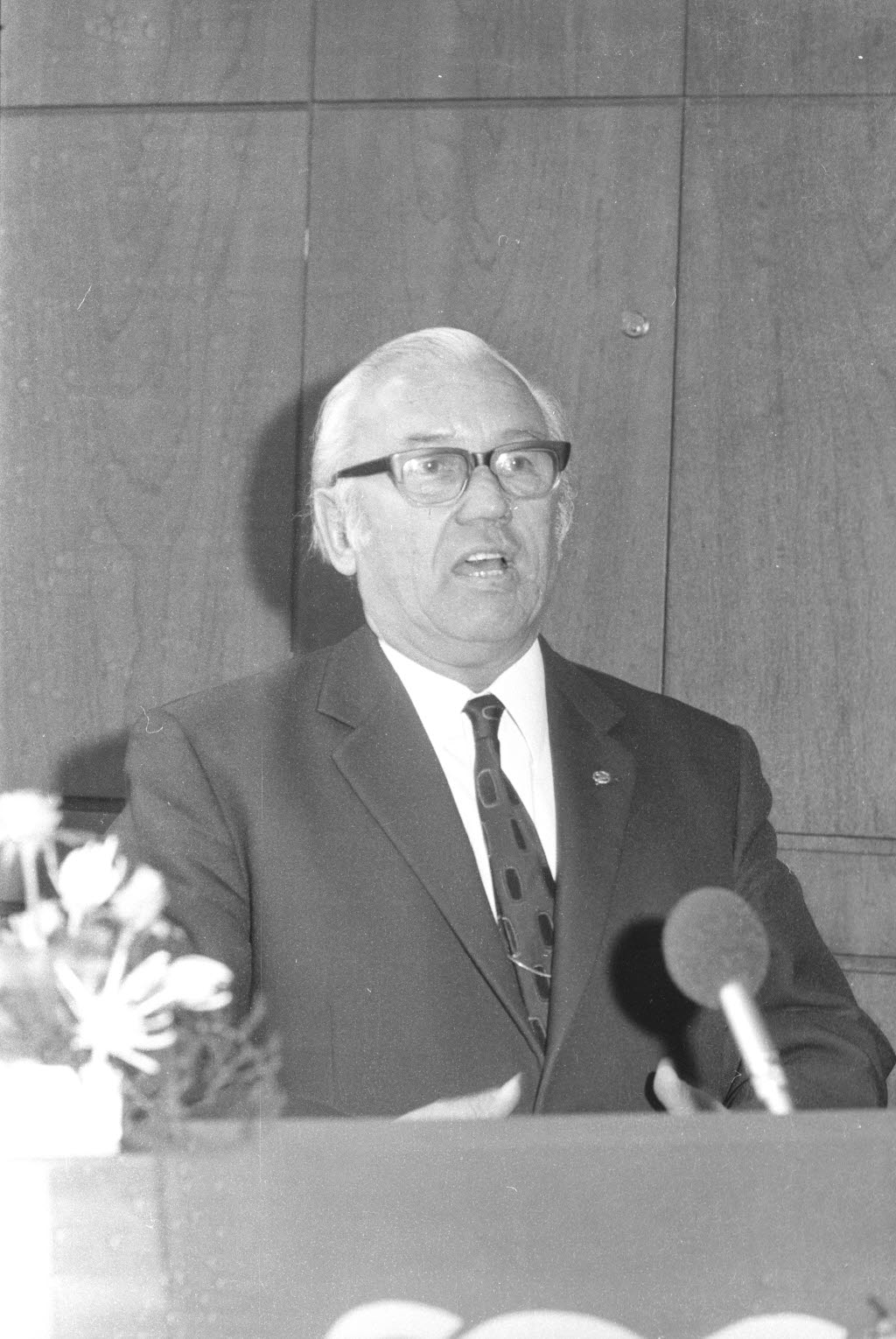 Ehrenvorsitzender des Verbandes der Heimkehrer, Kriegsgefangenen und Vermißtenangehörigen (VdH). Der 12. Landesverbandstag des VdH wählt seinen scheidenden Vorsitzenden in dieses Ehrenamt.